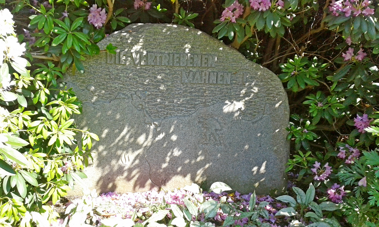 Gedenkstein Vertriebene in Bad Schwartau / am Kurparksee